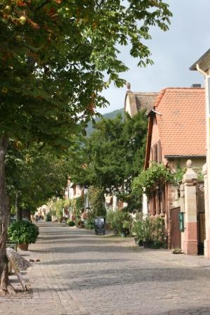 eigen werk